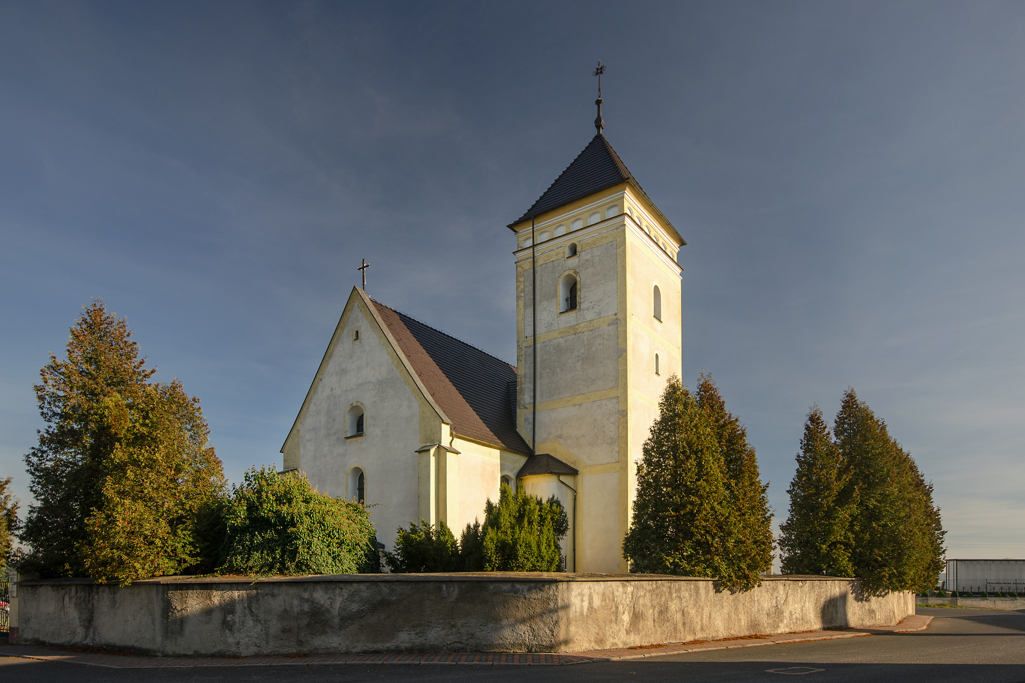 Rogów Opolski - rzymskokatolicki kościół parafialny p.w. śś. Filipa i Jakuba Starszego, kon. XIII, XVI, XX